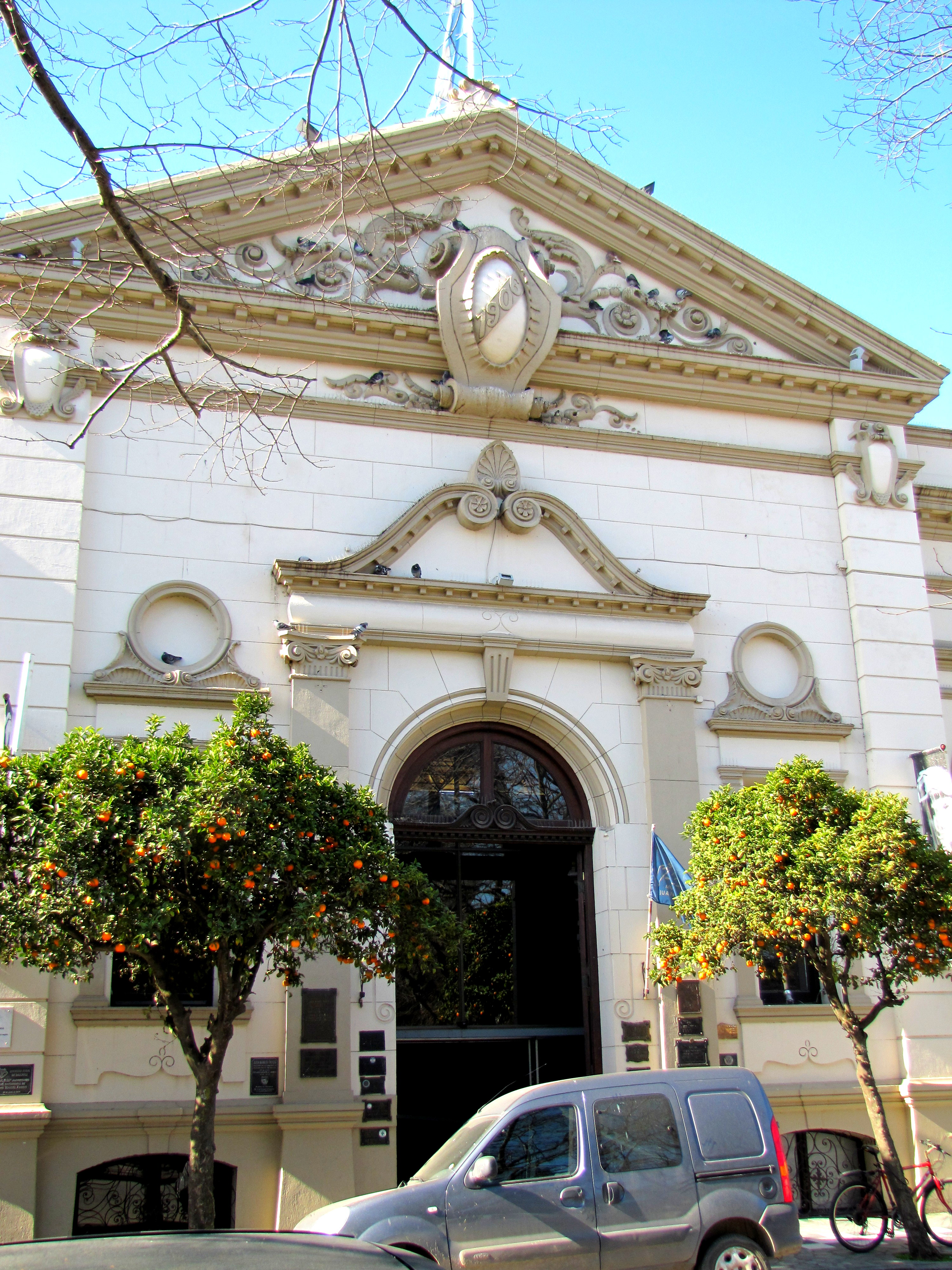 Conjunto Plaza Libertad